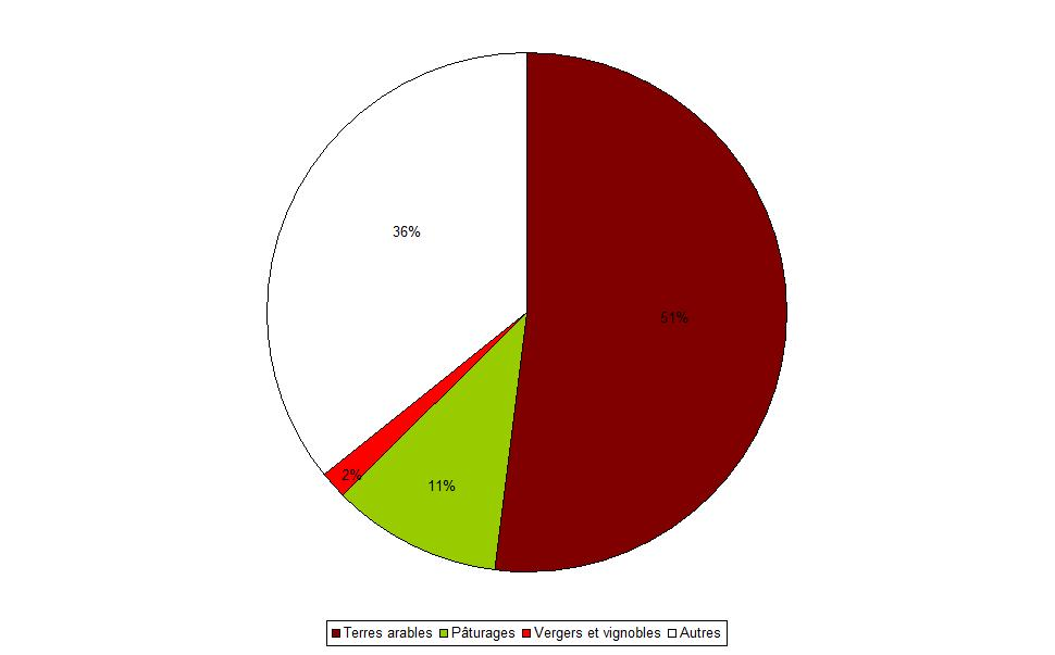 Répartition de l'utilisation des terres agricoles à Meikirch (Suisse) en 2009.